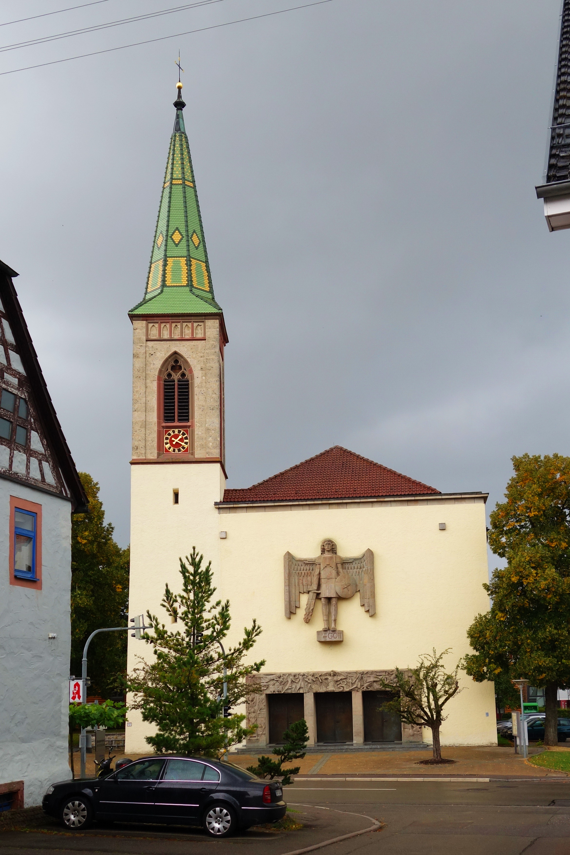 Katholische Kirche St. Michael in Denkingen